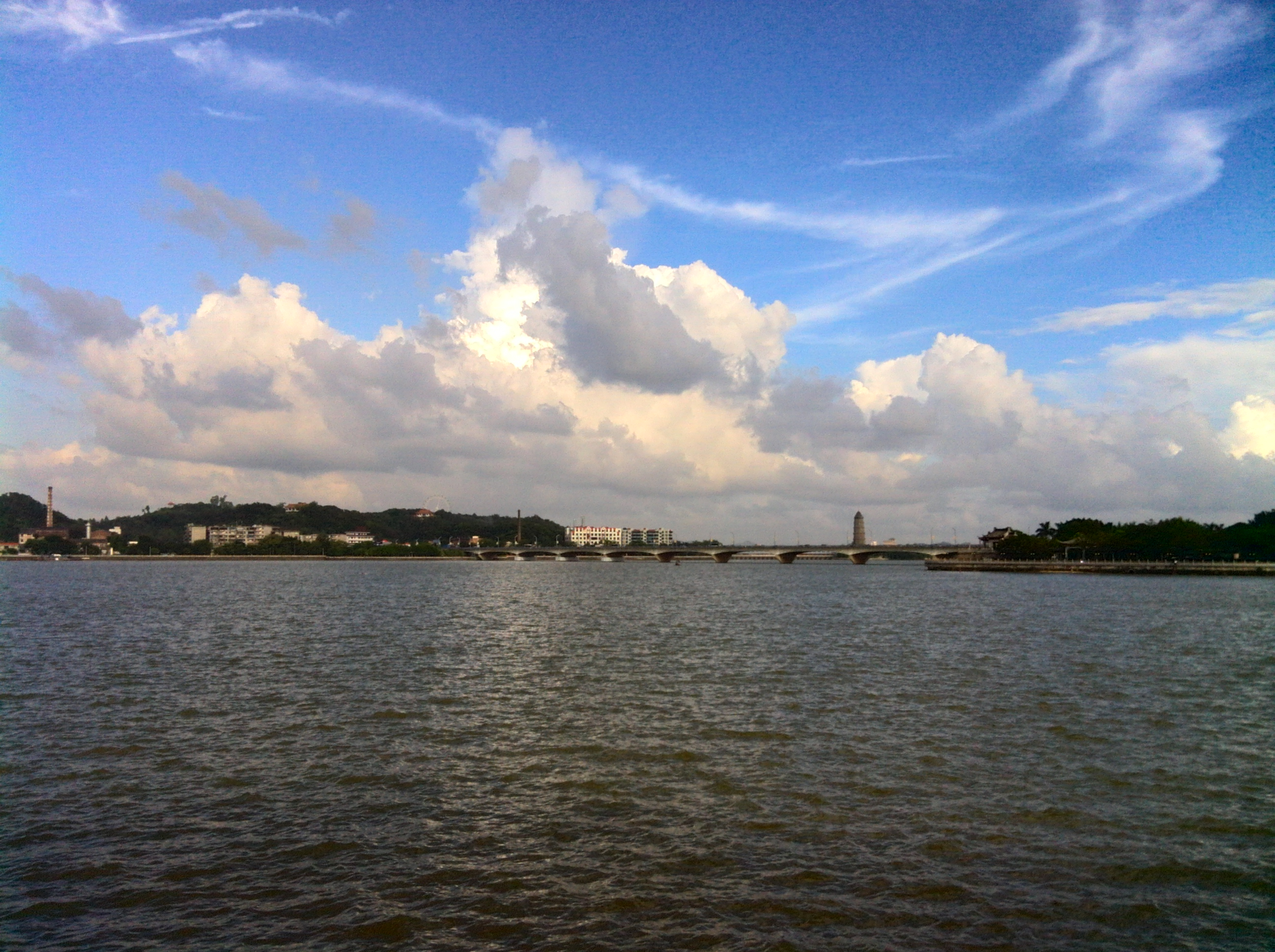 潮州韩江。